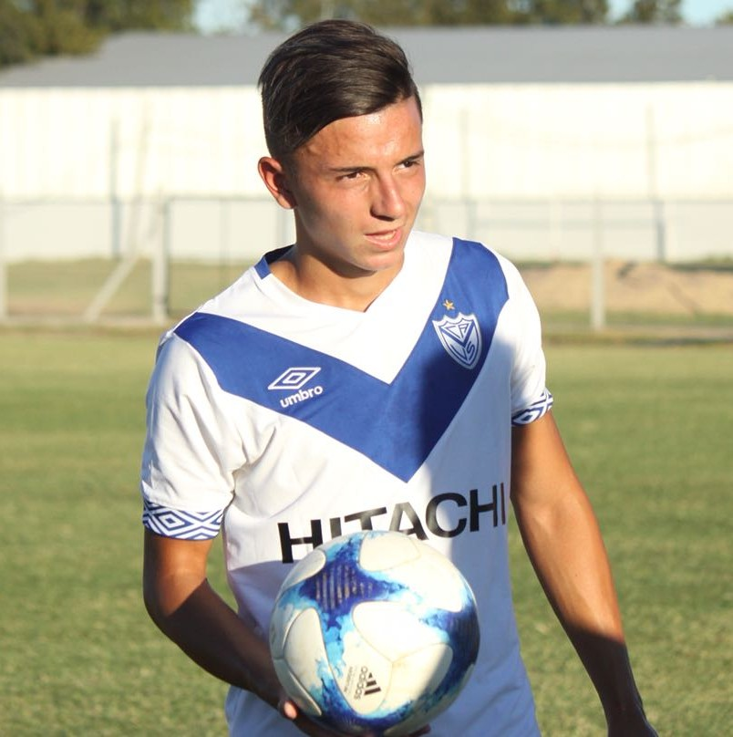 Álvaro Barreal en Vélez Sarsfield